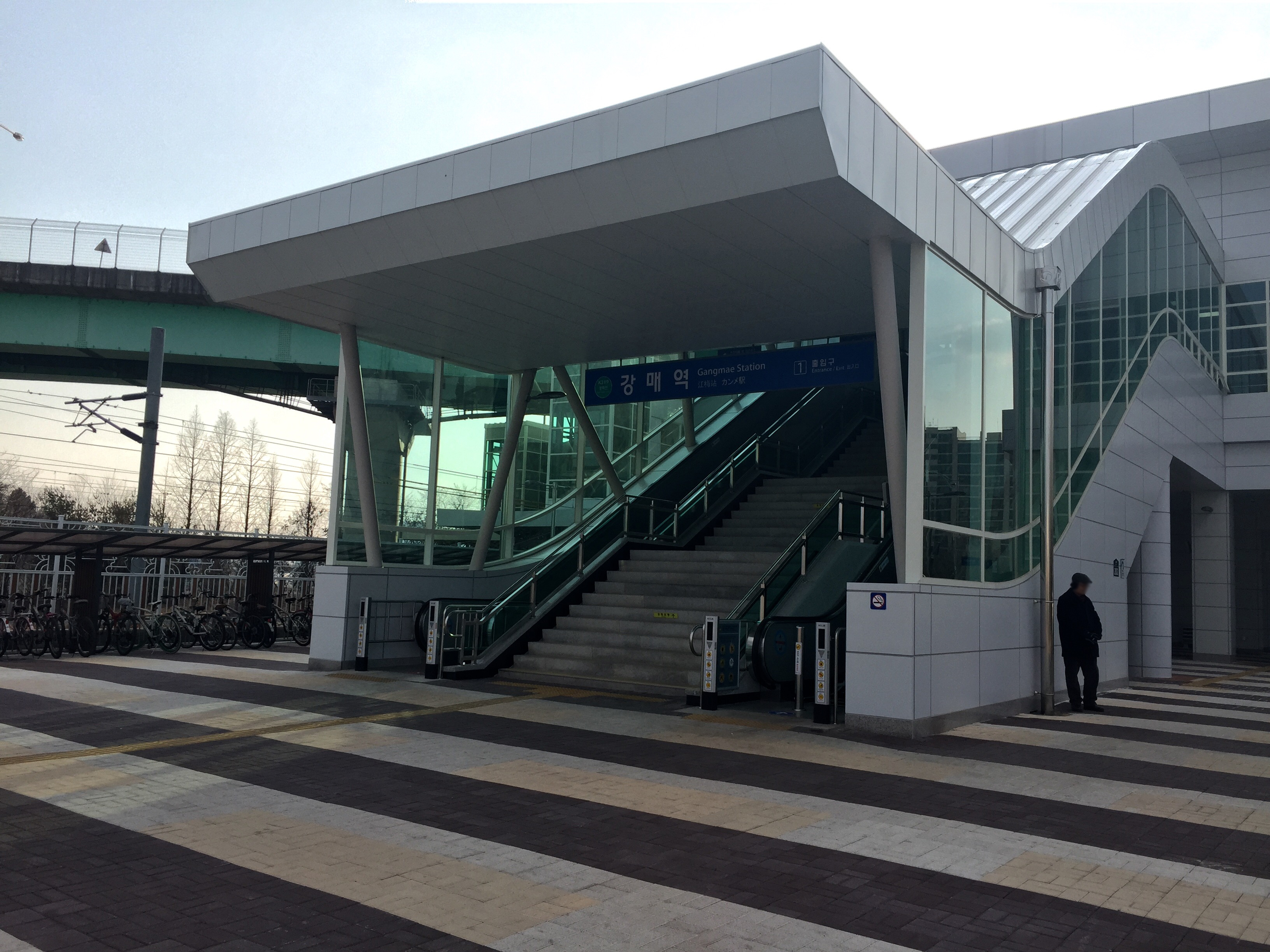 경의선 강매역 1번 출입구